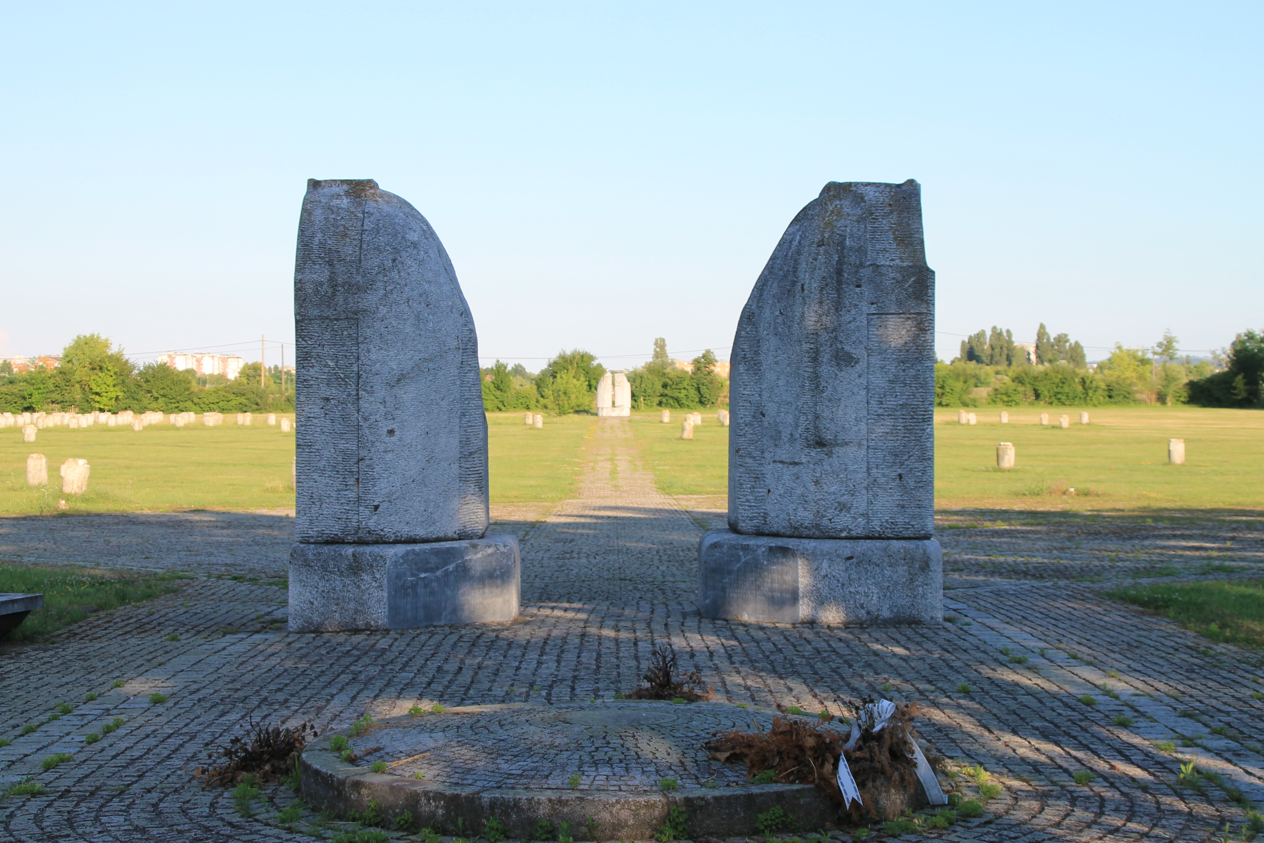 Spomen groblje NOR-a (Novi Sad)